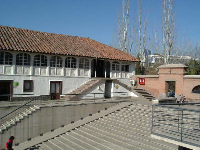 Fachada norte 2003